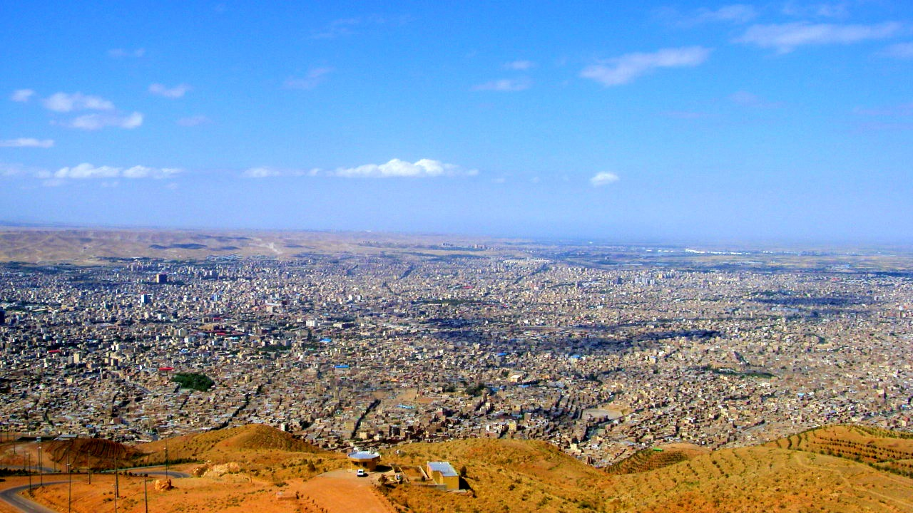 Vision Tabriz